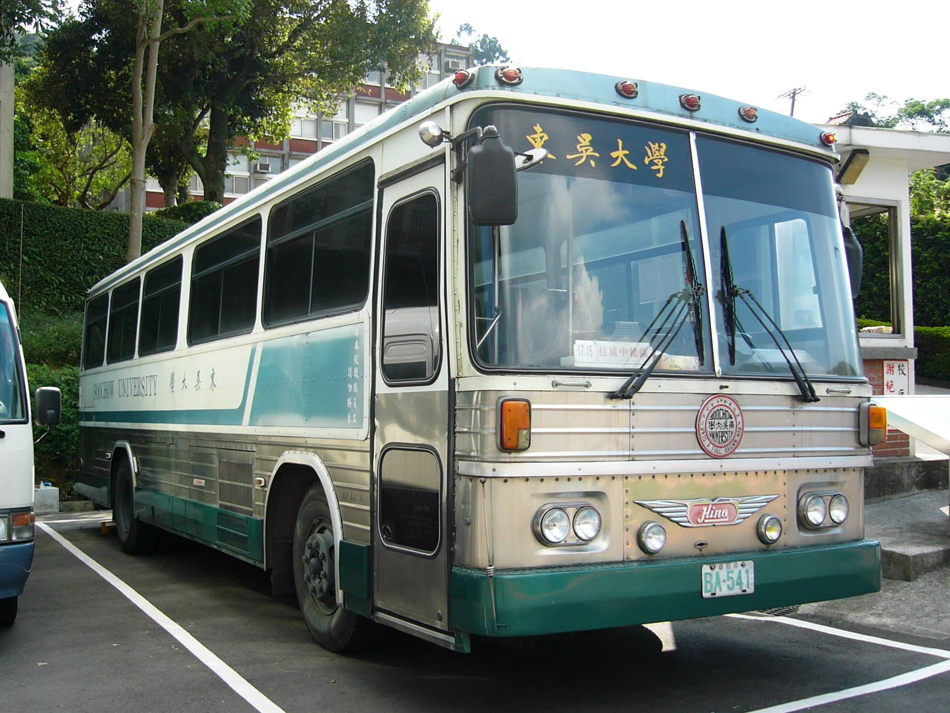 東吳大學教職員專用日野大客車BA-541，停在東吳大學外雙溪校區寵惠堂前。2018年5月重訪時已報廢，停在東吳大學外雙溪校區敬熙路人文步道。